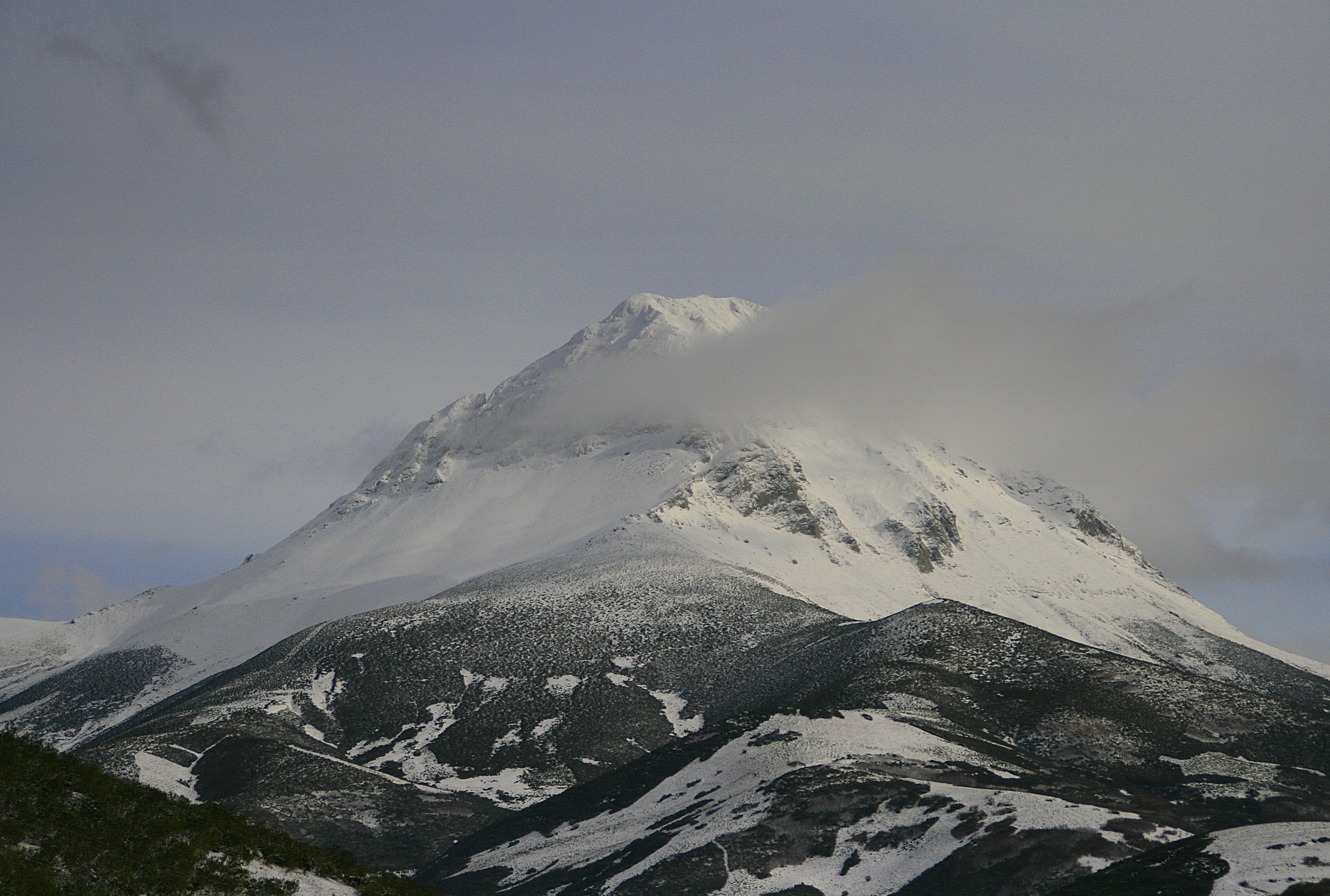 El Pico Espigüete (2.450 m.)es la cima más representativa del entorno natural de "La Montaña Palentina", situada en el norte de la provincia de Palencia, junto al pueblo de Cardaño de Abajo, comunidad de Castilla y León (España). Es una montaña de piedra caliza blanca que desde determinadas vistas parece una esbelta pirámide de gran belleza y gran solidez. Visto desde Valverde de la Sierra.León.